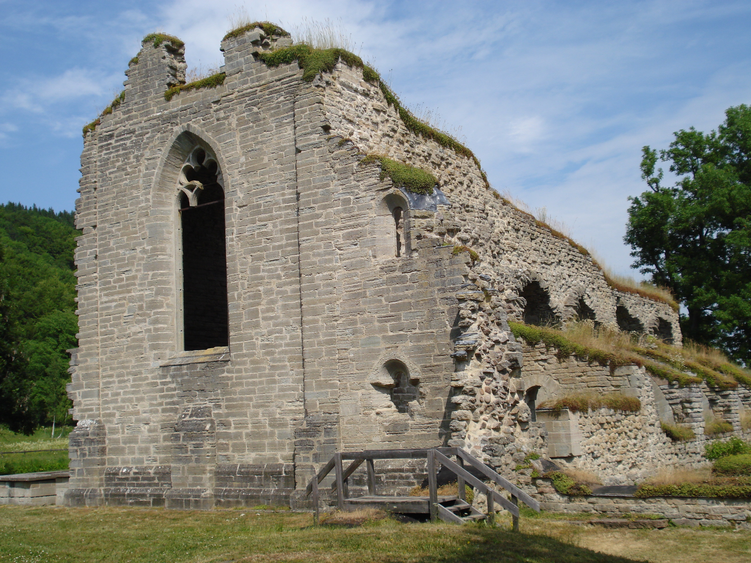 Alvastra kloster. Klosterkyrkans västra fasad.